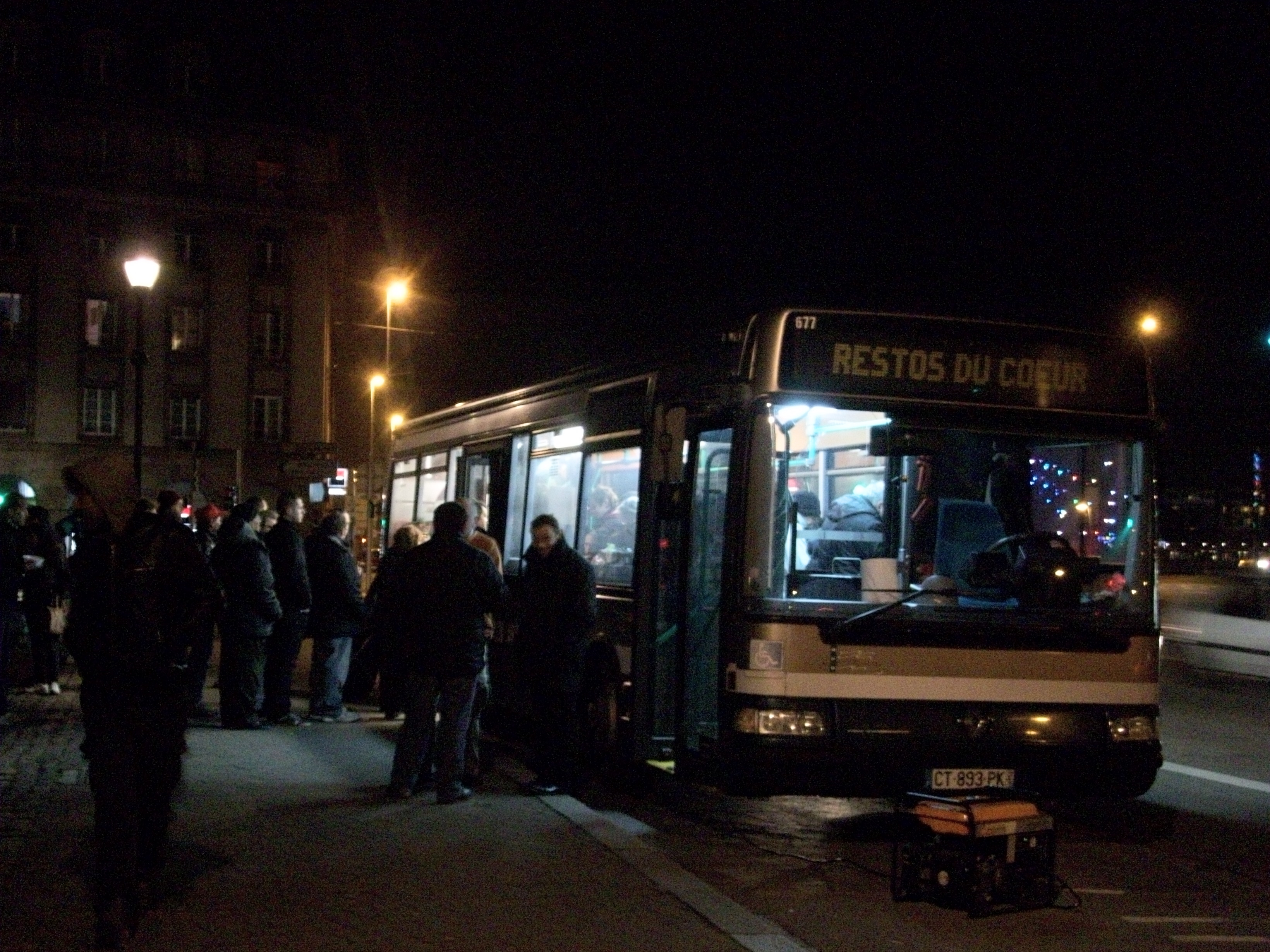 Ancien autobus de la CTS, servant pour les Restos du Coeur